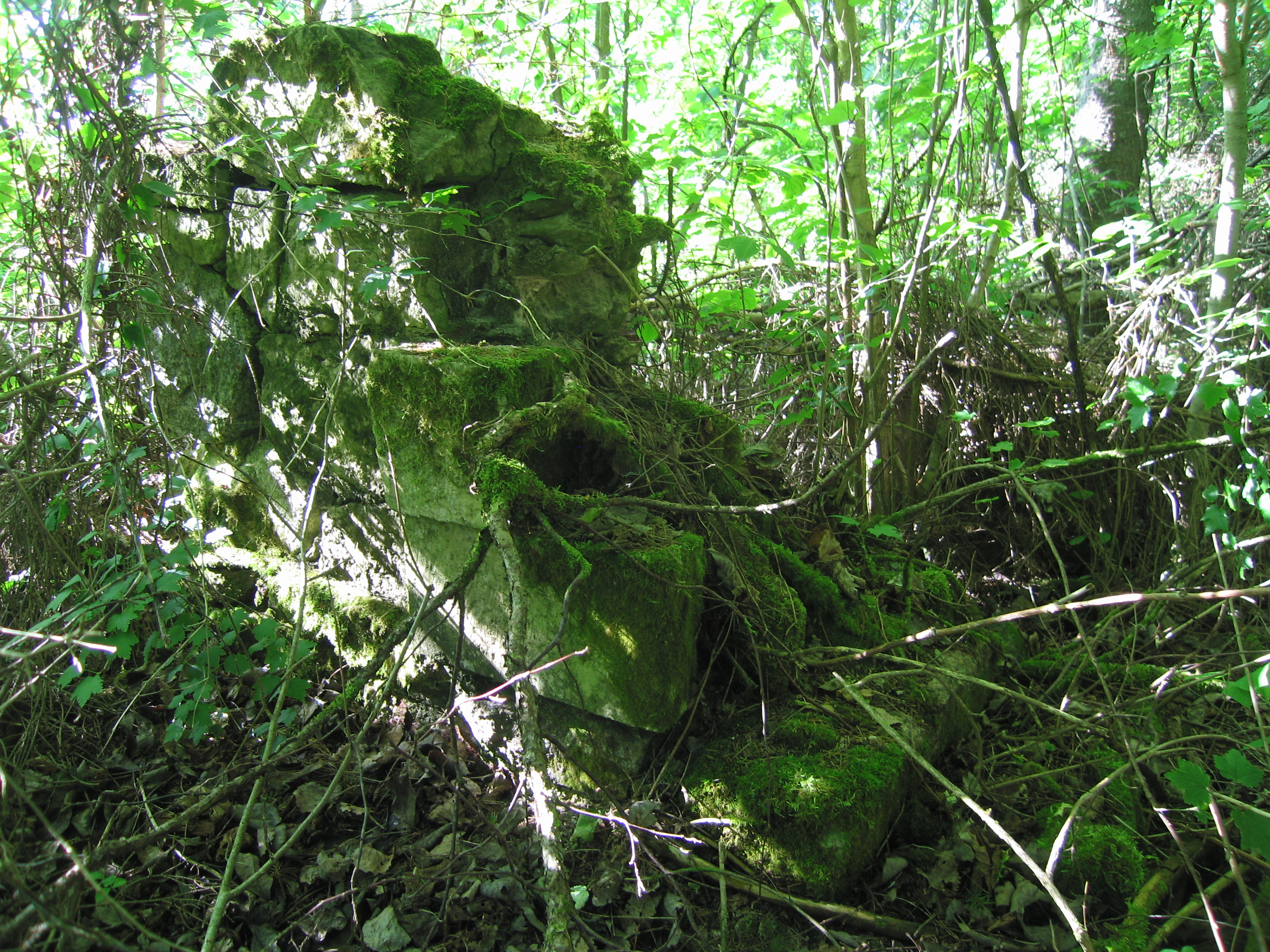 Kalmistu värava lõunaserv